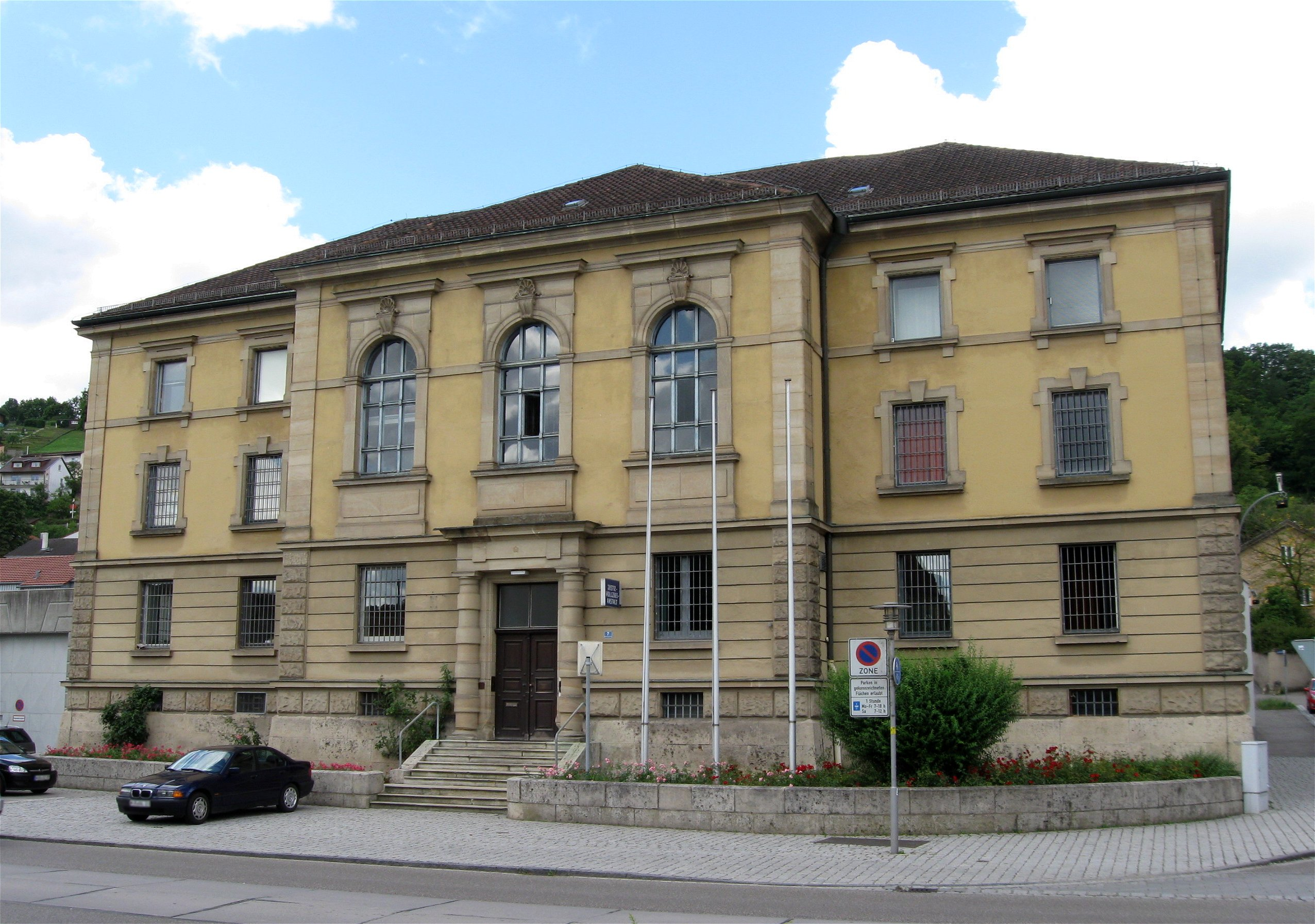 Weißenburger Straße 7; ehemaliges Land- und Amtsgerichtsgefängnis, heute Justizvollzugsanstalt, Anlage über T-förmigem Grundriss, breitgelagerter dreigeschossiger Verwaltungsbau in neuklassizistischen Formen mit Mittelrisalit, rückwärtig langgestreckter Zellentrakt, Haustein, 1899-1900 erbaut; im Innern Gefängniskapelle von 1901 mit Ausstattung. D-1-76-123-264